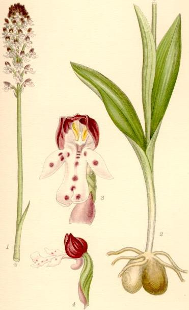 Krutbrännare (Orchis ustulata) stjälkens övre hälft med blomställningen, stjälkbasen med amrötterna, blomma med skärmbladet, sedd framifrån (8/1), blomma sedd från vänster sida (5/1).